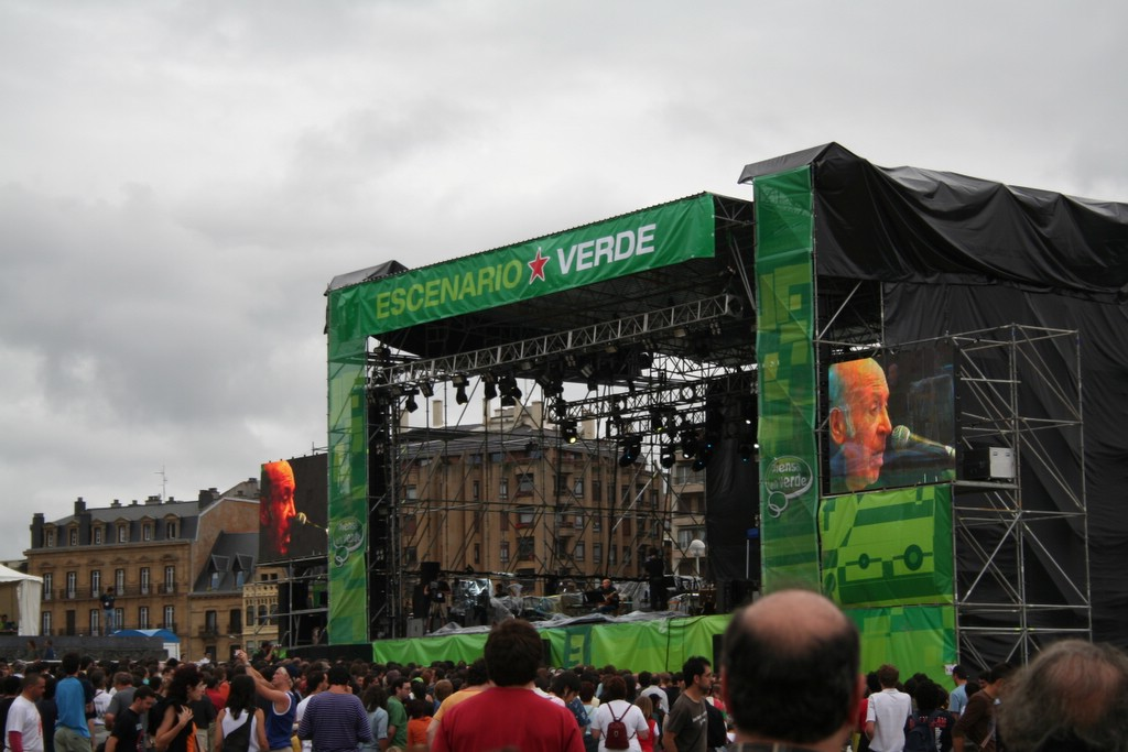 Mikel Laboa kontzertuan, Donostia 2006ko uztaila